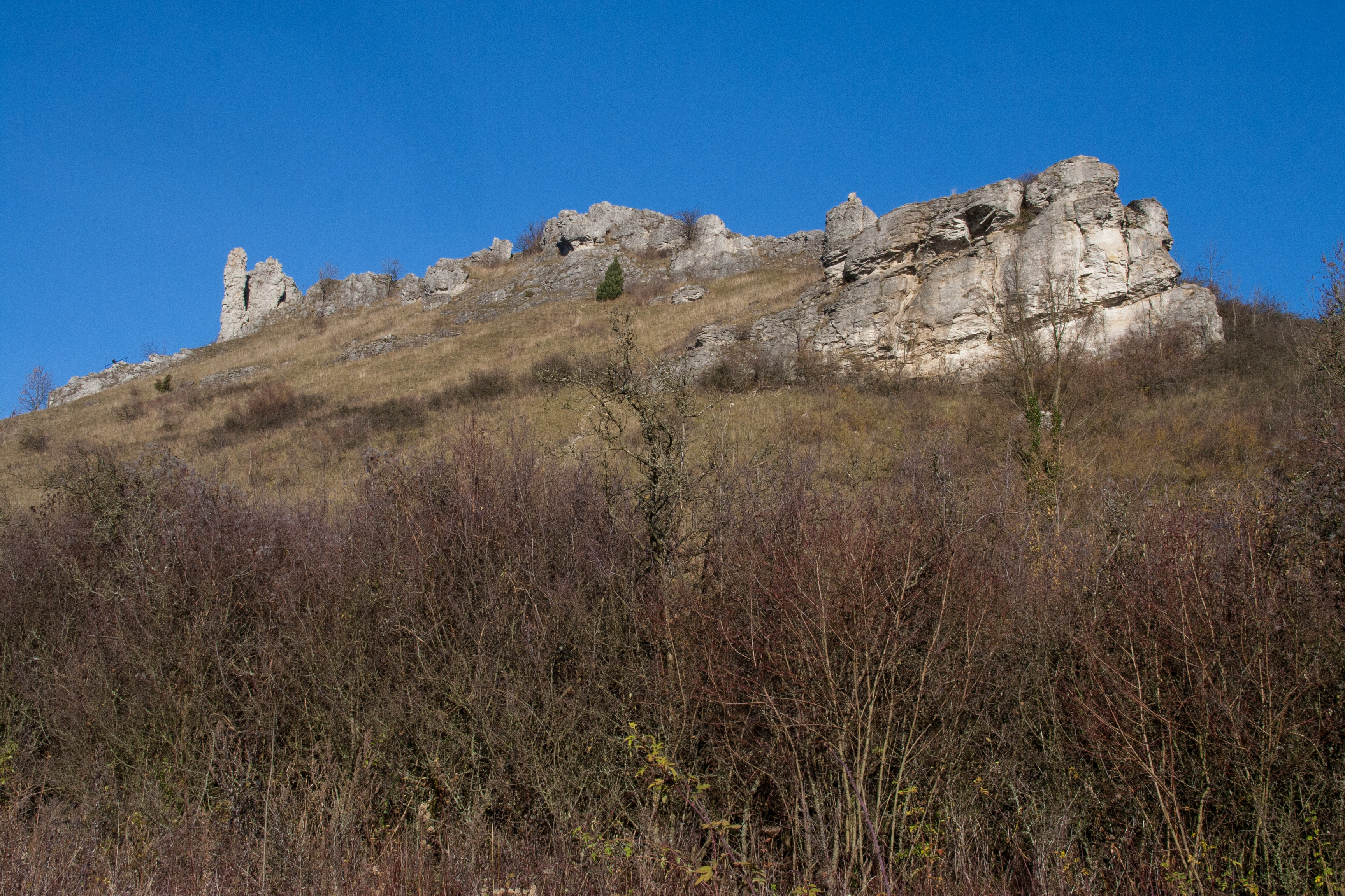 Ehrenbürg, Walberla